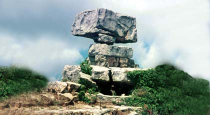 Piana degli Albanesi, provincia di Palermo, Sicilia, Italia. All'entrata storica del abitato, nella parte bassa della contrada Brinja, in prossimità della Kryqa e Palermës (individuabile all'incirca nei pressi dell'attuale pompa di benzina), si erigevano Çapelet e drangoit (le Lastre del drago), massi tipici del paesaggio di Piana degli Albanesi. Si trattava di un enorme gruppo di rocce che poggiava su rocce più piccole. Furono inesorabilmente distrutti con un grosso carico di mine negli anni '70 per la costruzione di case nel vicinato, con l'accusa di non esser sicure. Lo sconforto dei cittadini, increduli ad azione fatta, accusarono a loro volta l'atto di mera speculazione edilizia. Ad oggi non vi è nulla che le ricordi, mentre esse hanno caratterizzato nei secoli l'immaginario e le favole collettive (come quello della presenza di un drago nelle sue interno) del popolo albanese che qui aveva messo radici.